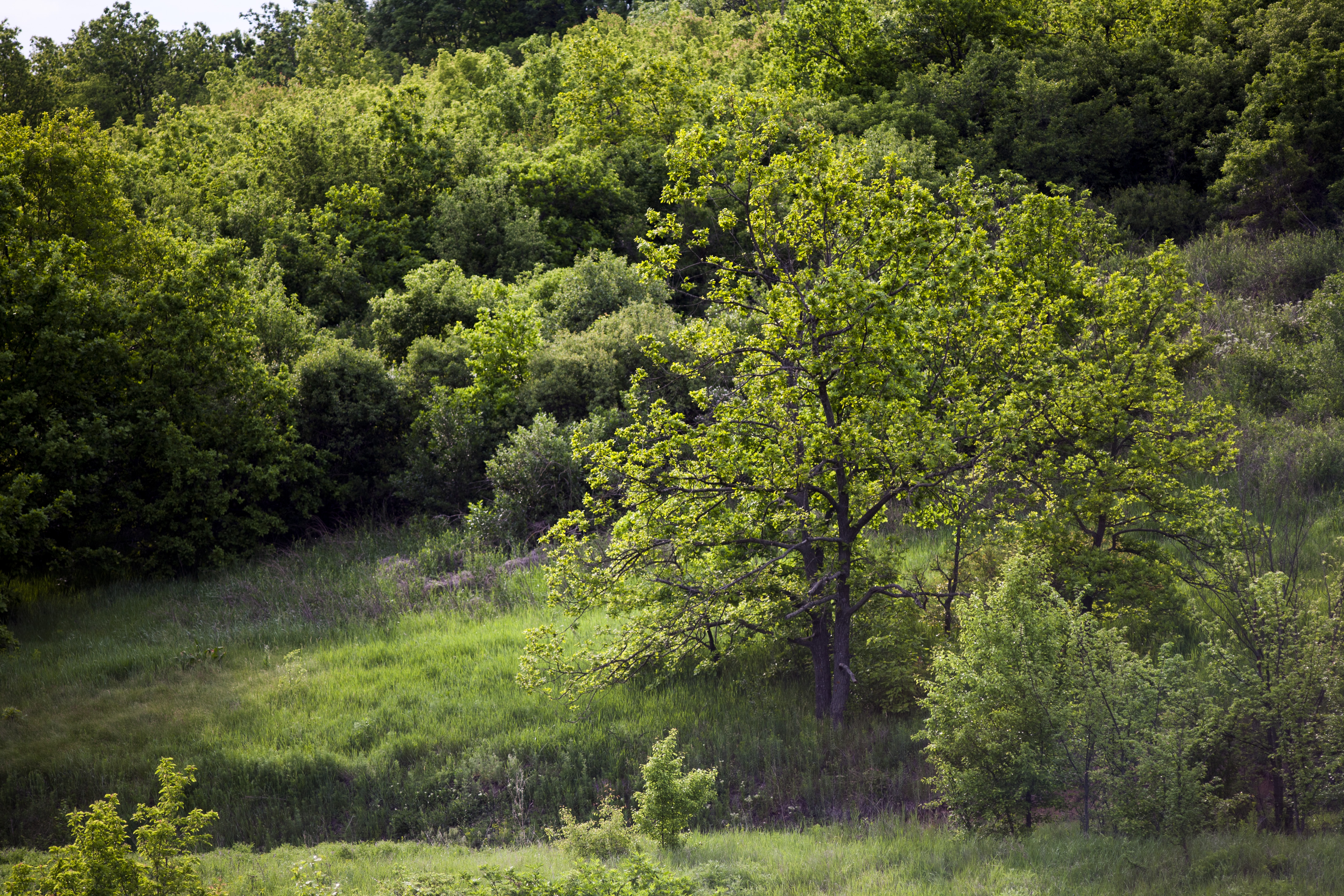 «Осинівський» / «Березовий гай», Ширяївський р-н, Осинівська сільська рада, Ширяївське лісництво, кв. 13-20